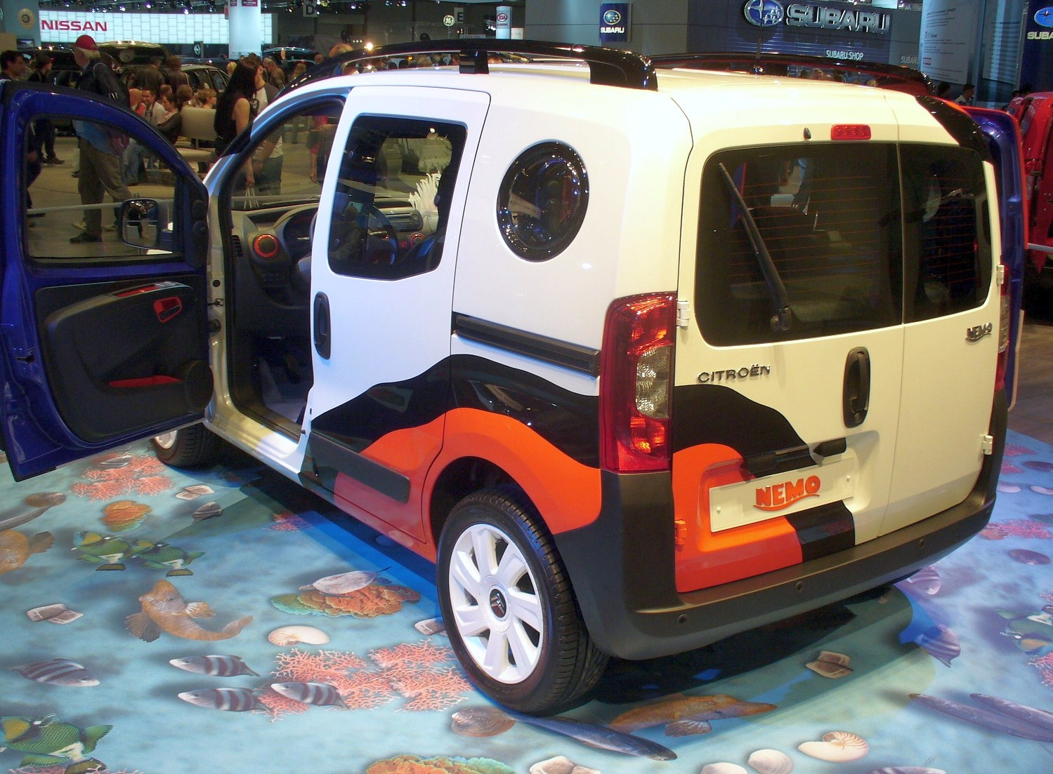 Citroën Nemo